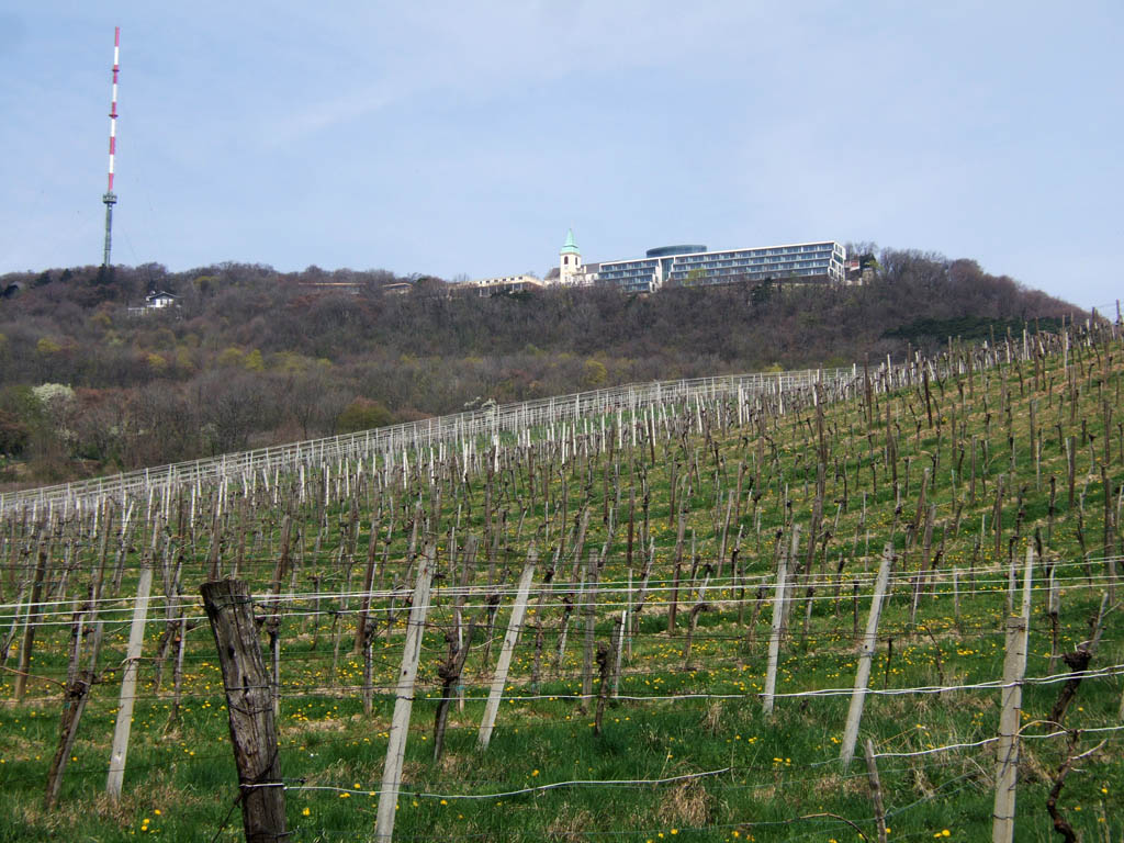 Kahlenberg